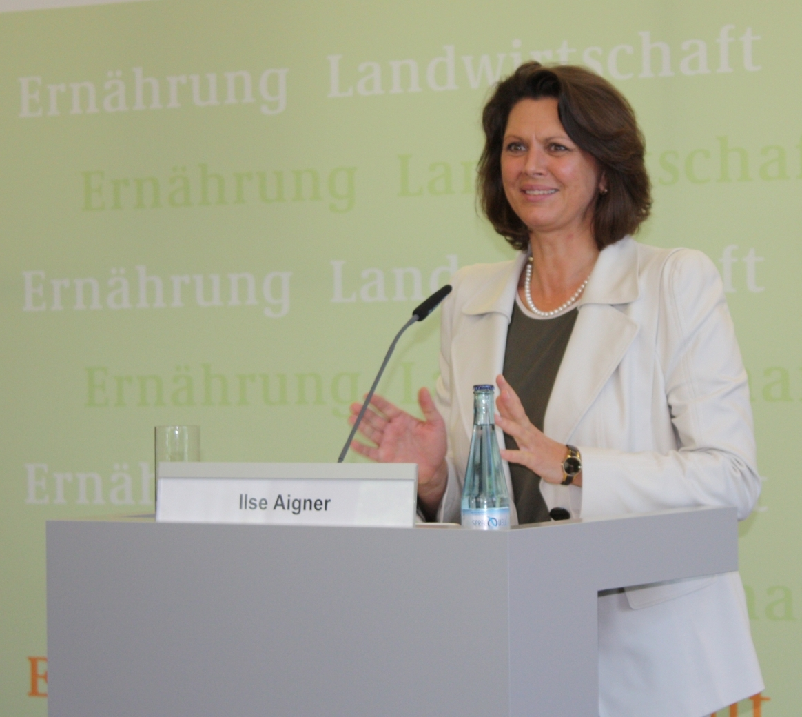 Ilse Aigner, Bundesministerin für Ernährung, Landwirtschaft und Verbraucherschutz.